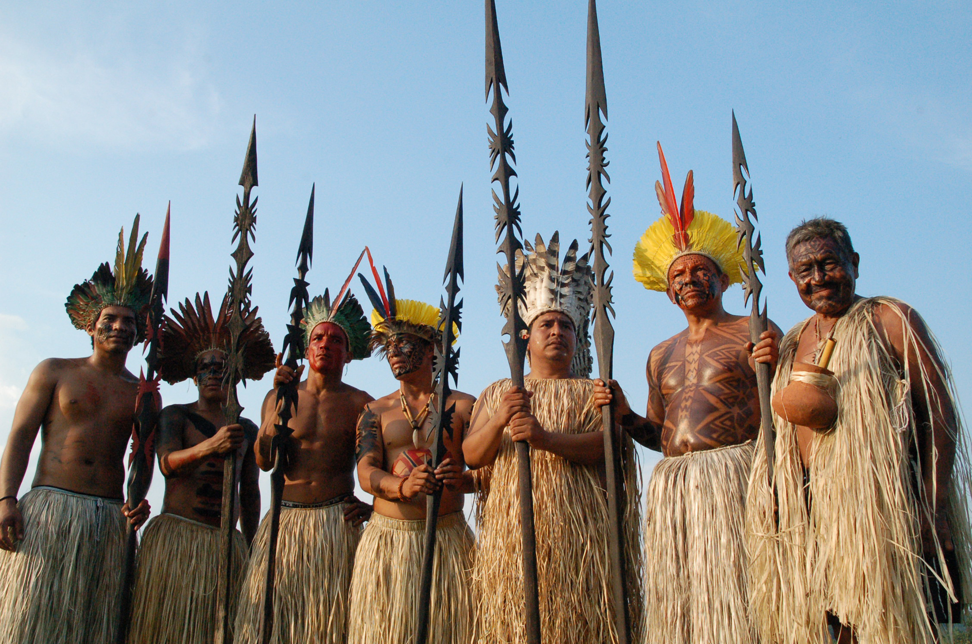 Índios Iauanauás